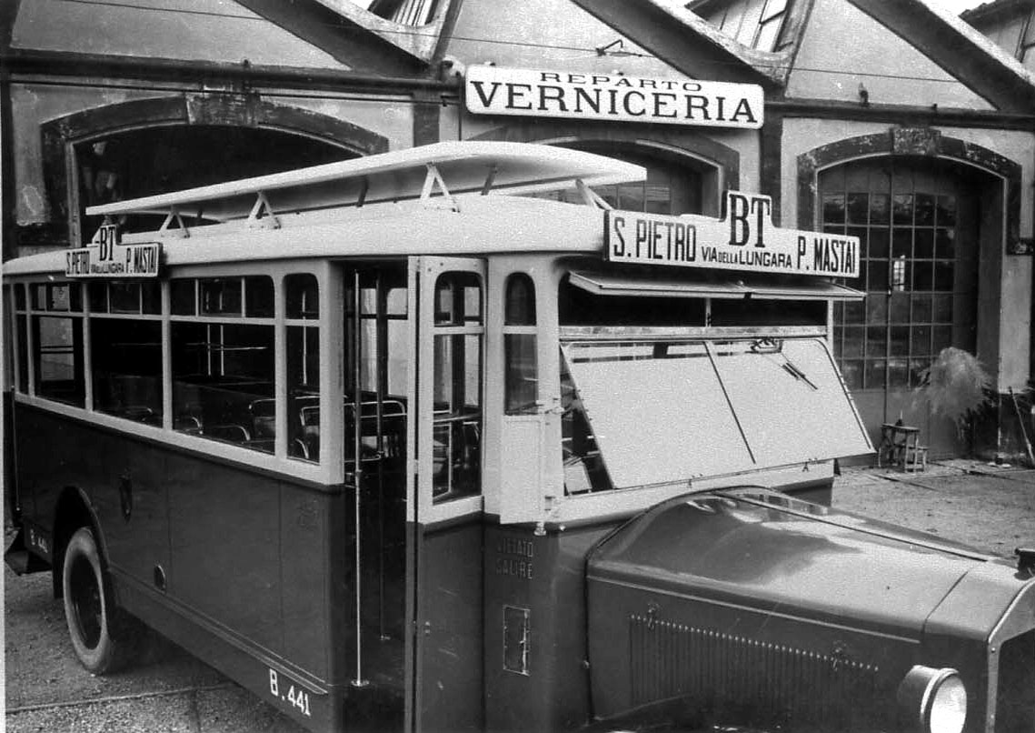 Autobus Lancia Omicron di Roma. Vettura con lucernario per aerazione.